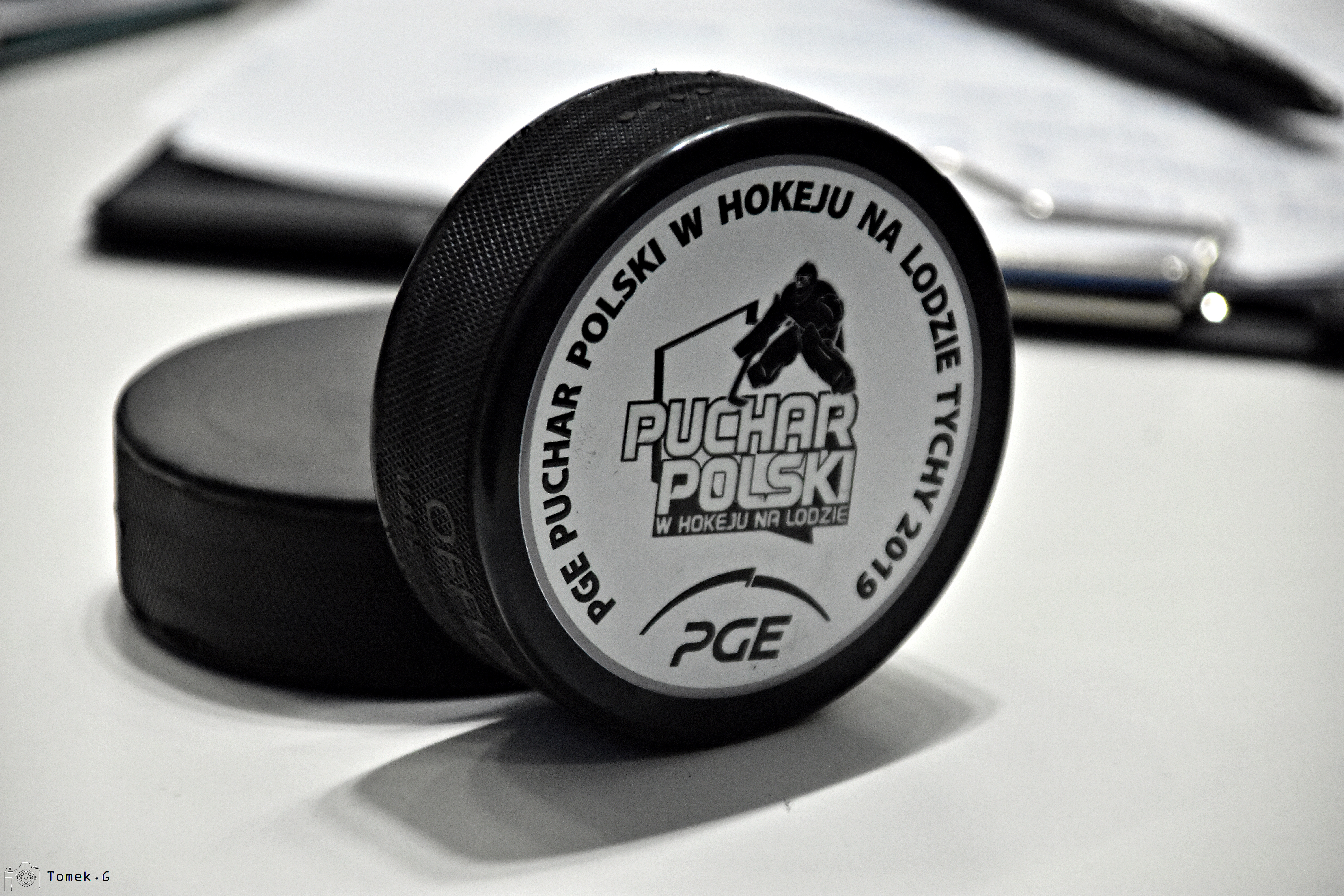 Puchar Polski w Hokeju na Lodzie 2019/2020